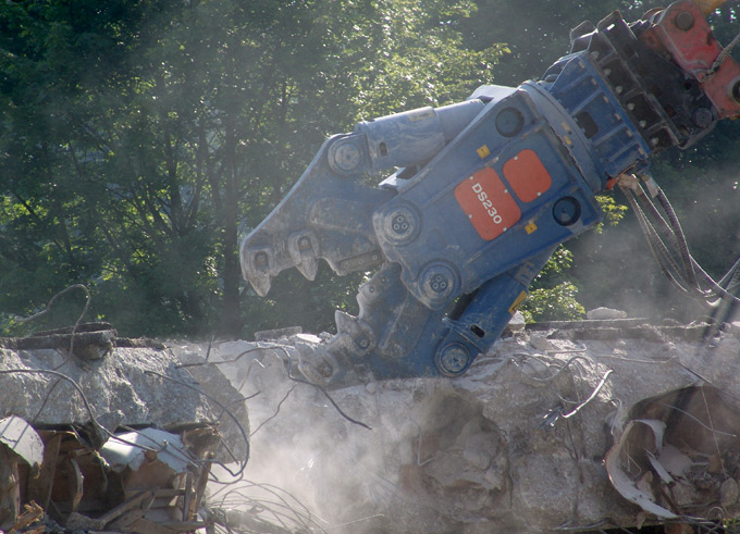 Beschreibung: Eine Abbruchzange beim Abbruch einer Brücke / A demolition shear just working on a bridge